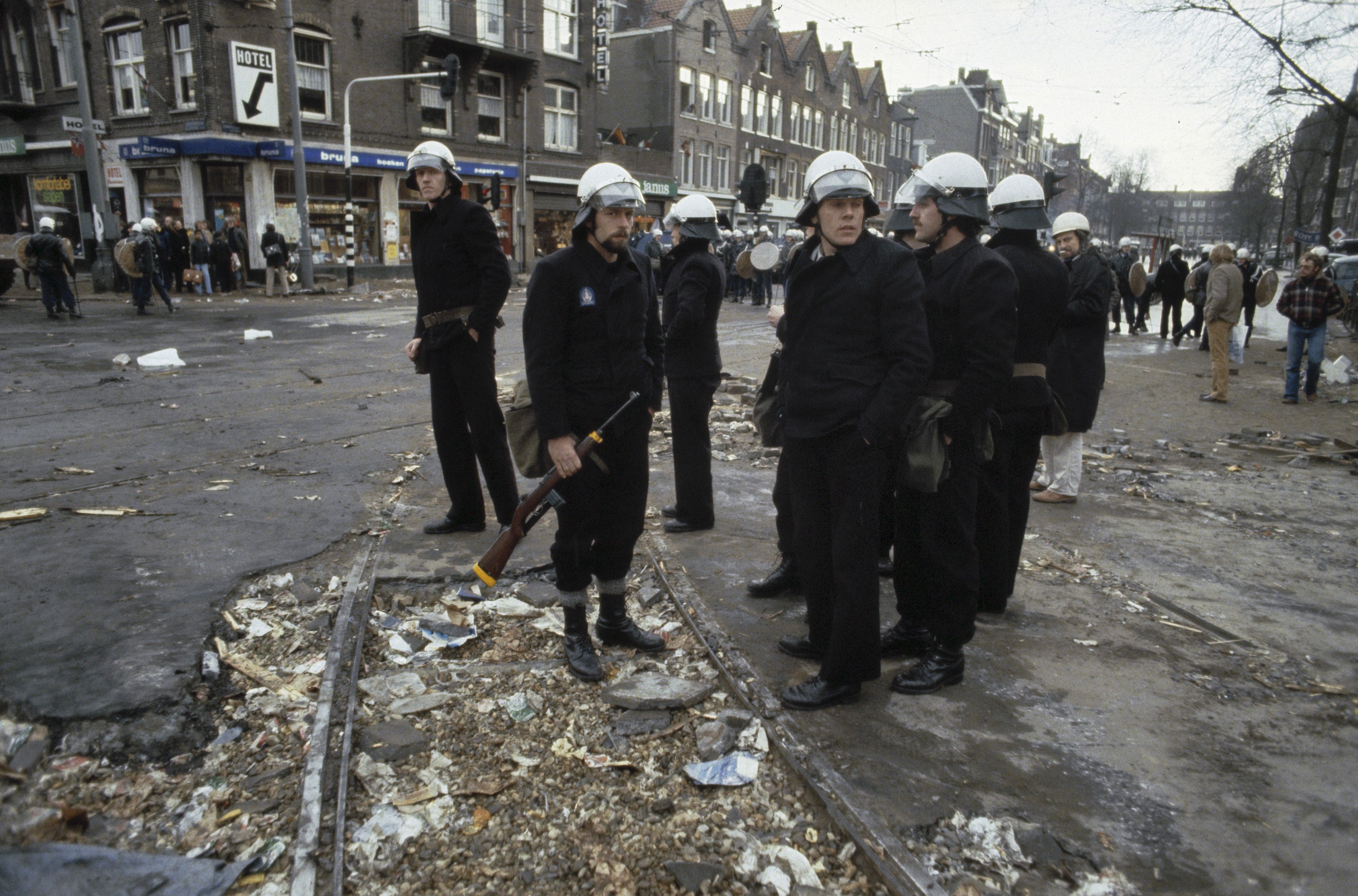 Collectie / Archief : Fotocollectie Anefo Reportage / Serie : [ onbekend ] Beschrijving : ME , tanks en pantserv. ruimen barricades rond kraakpand in Vondelbuurt Adam; ME op Overtoom en Rijkspolitie met karabijn Datum : februari 1980 Locatie : Amsterdam, Noord-Holland Trefwoorden : Mobiele Eenheid, TANKS, kraakpanden Persoonsnaam : Overtoom Fotograaf : Croes, Rob C. / Anefo Auteursrechthebbende : Nationaal Archief Materiaalsoort : Dia (kleur) Nummer archiefinventaris : bekijk toegang 2.24.01.06 Bestanddeelnummer : 253-8154